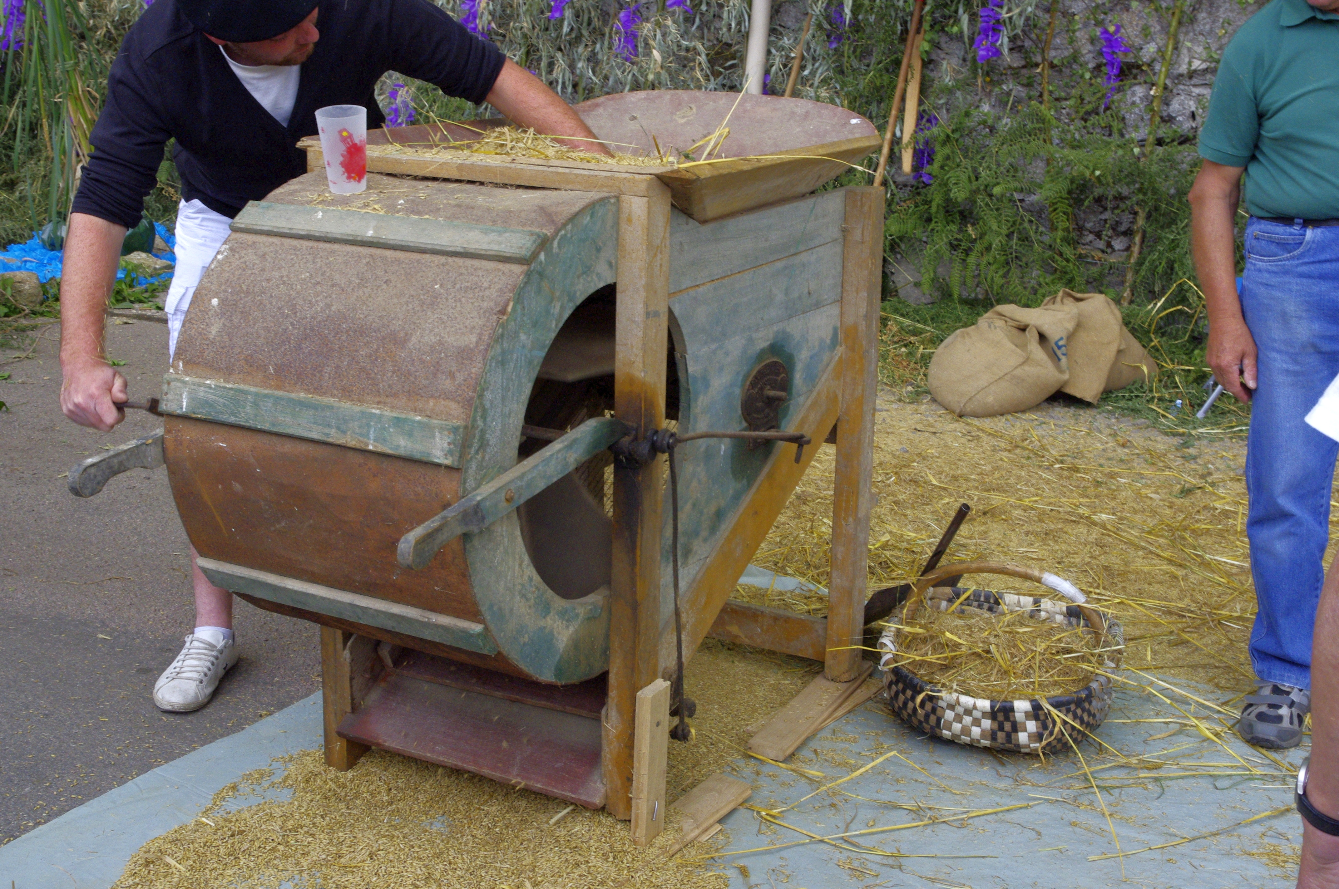 Félibrée à Piégut-Pluviers 2012 - battage à l'ancienne.